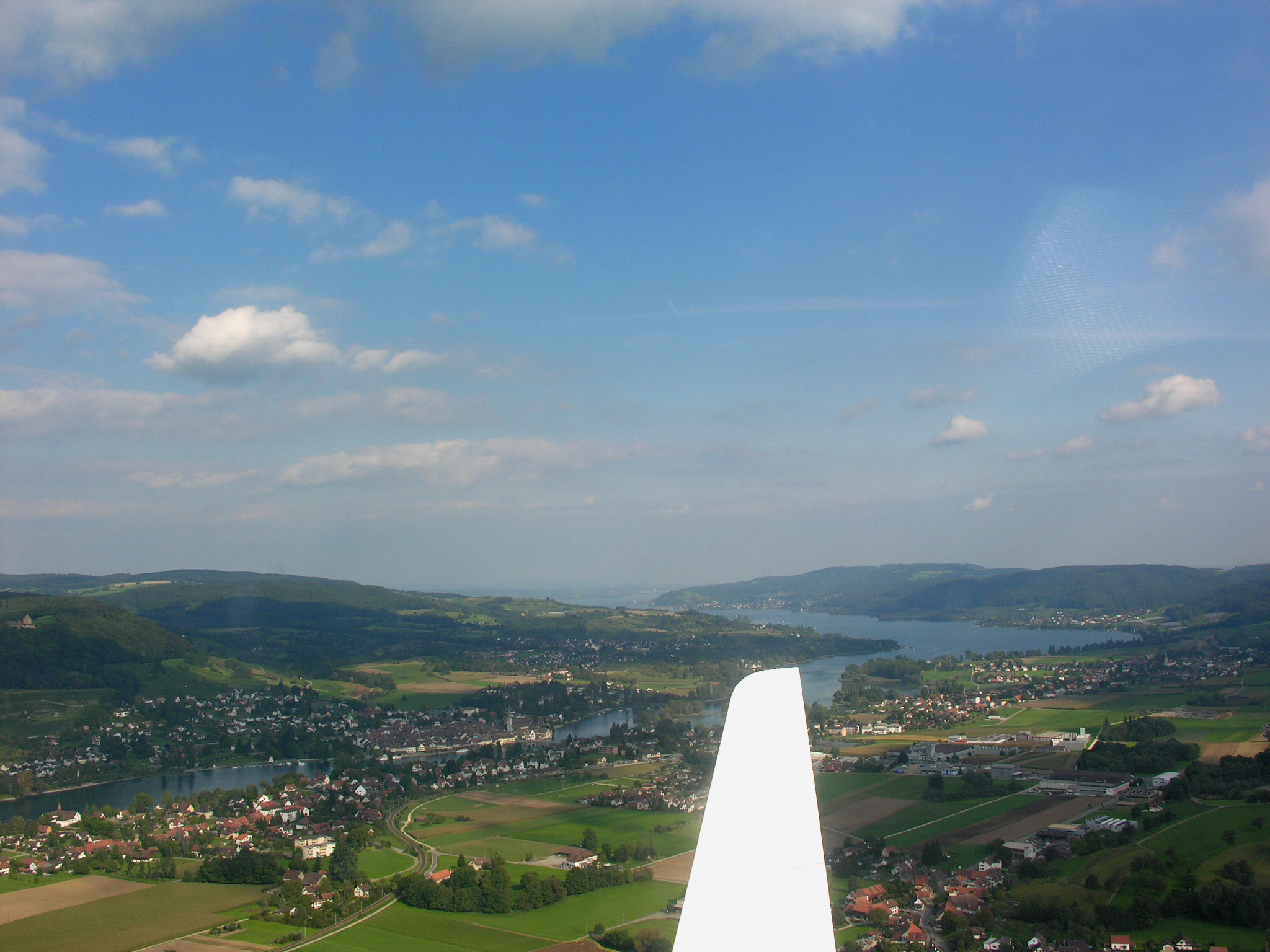 Switzerland, Thurgau, Aerial view of Wagenhausen, Stein am Rhein and Eschenz